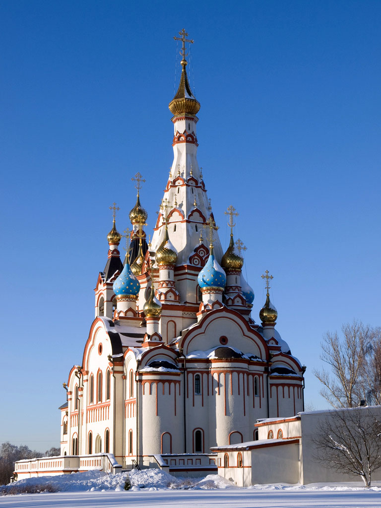 Храм Казанской Иконы Божьей Матери (Долгопрудный)